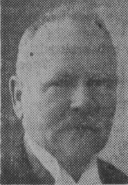 Arkitekten Carl Johan Perne